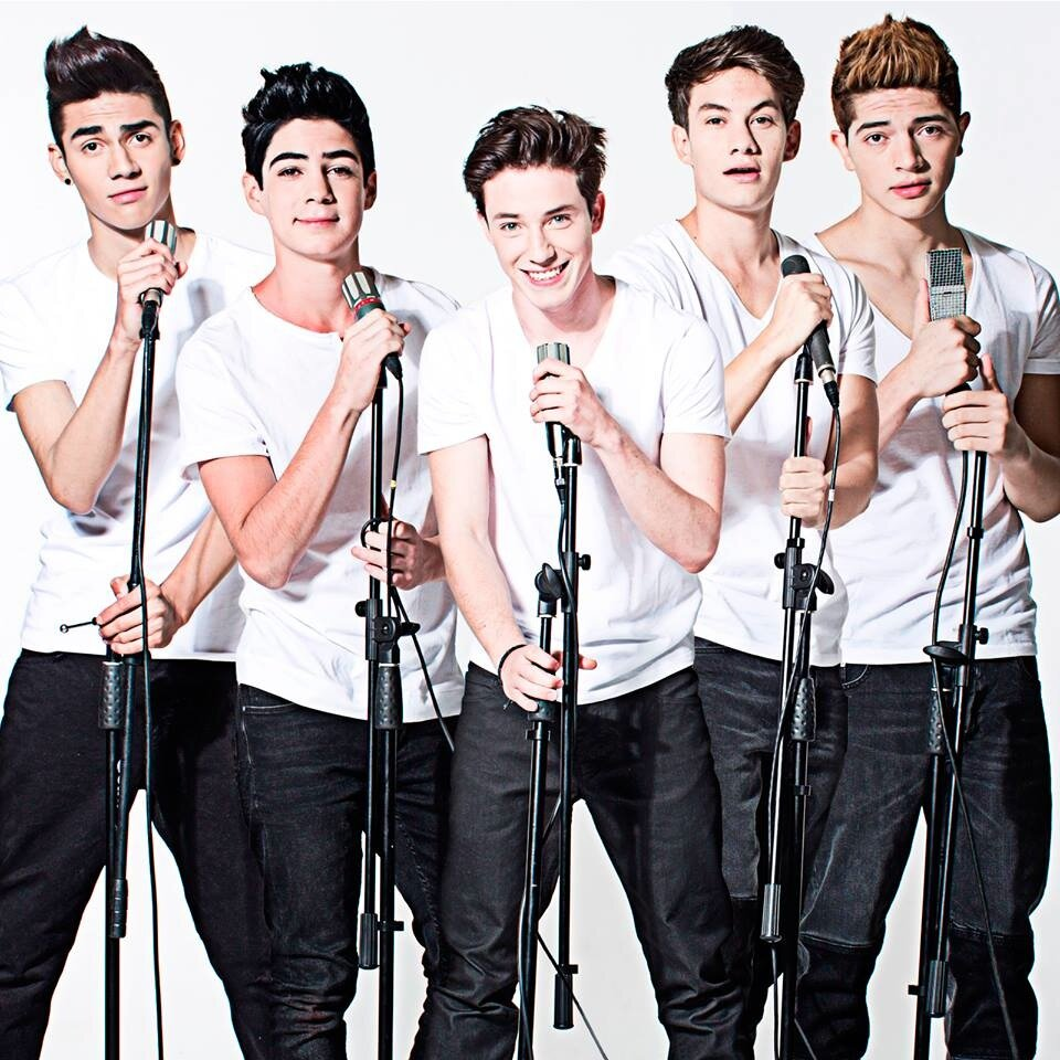 De Derecha a Izquierda: Freddy Leyva, Bryan Mouqe, Alonso Villalpando, Jos Canela, Alan Navarro.